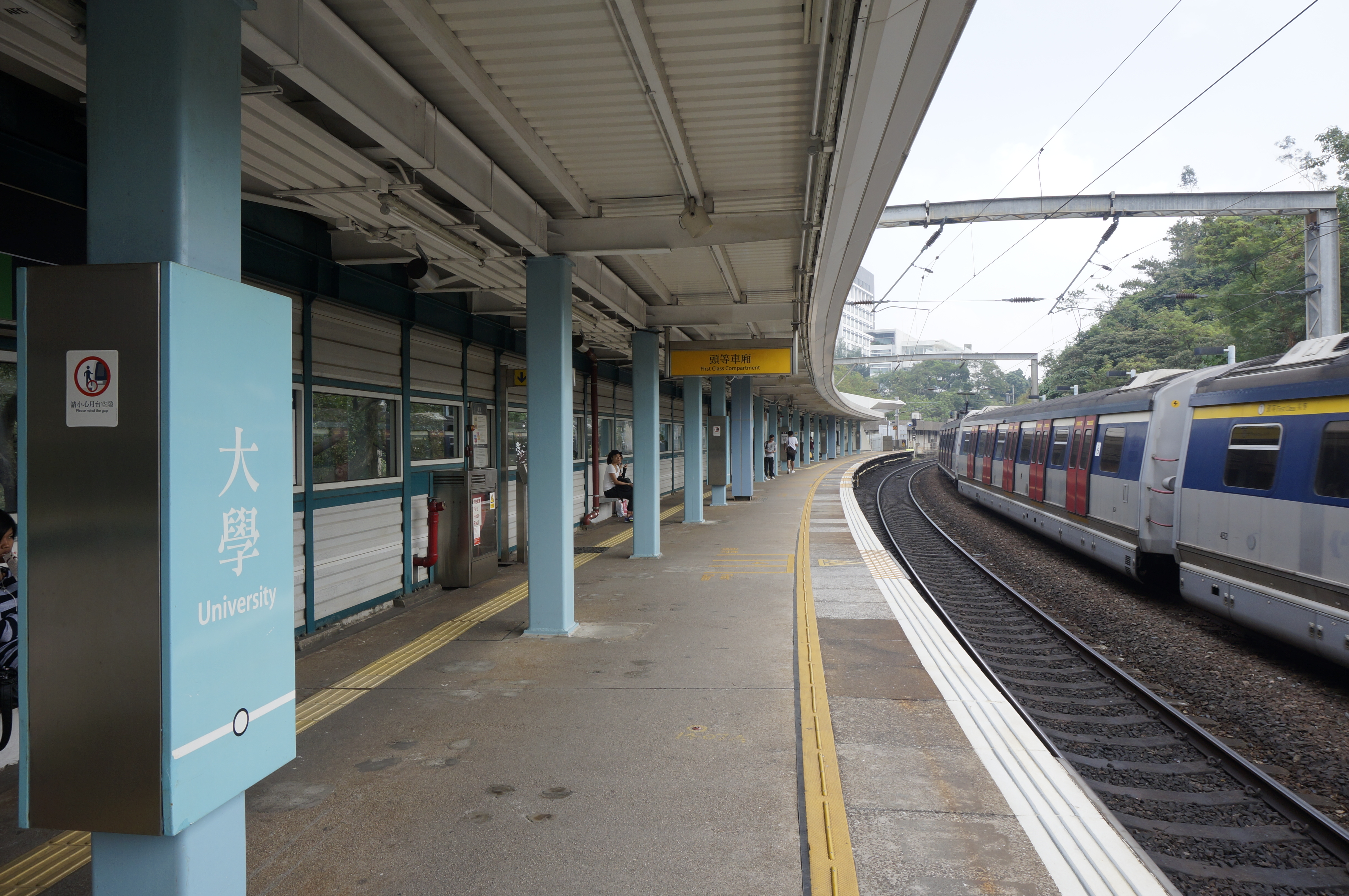 港鐵大學站月台